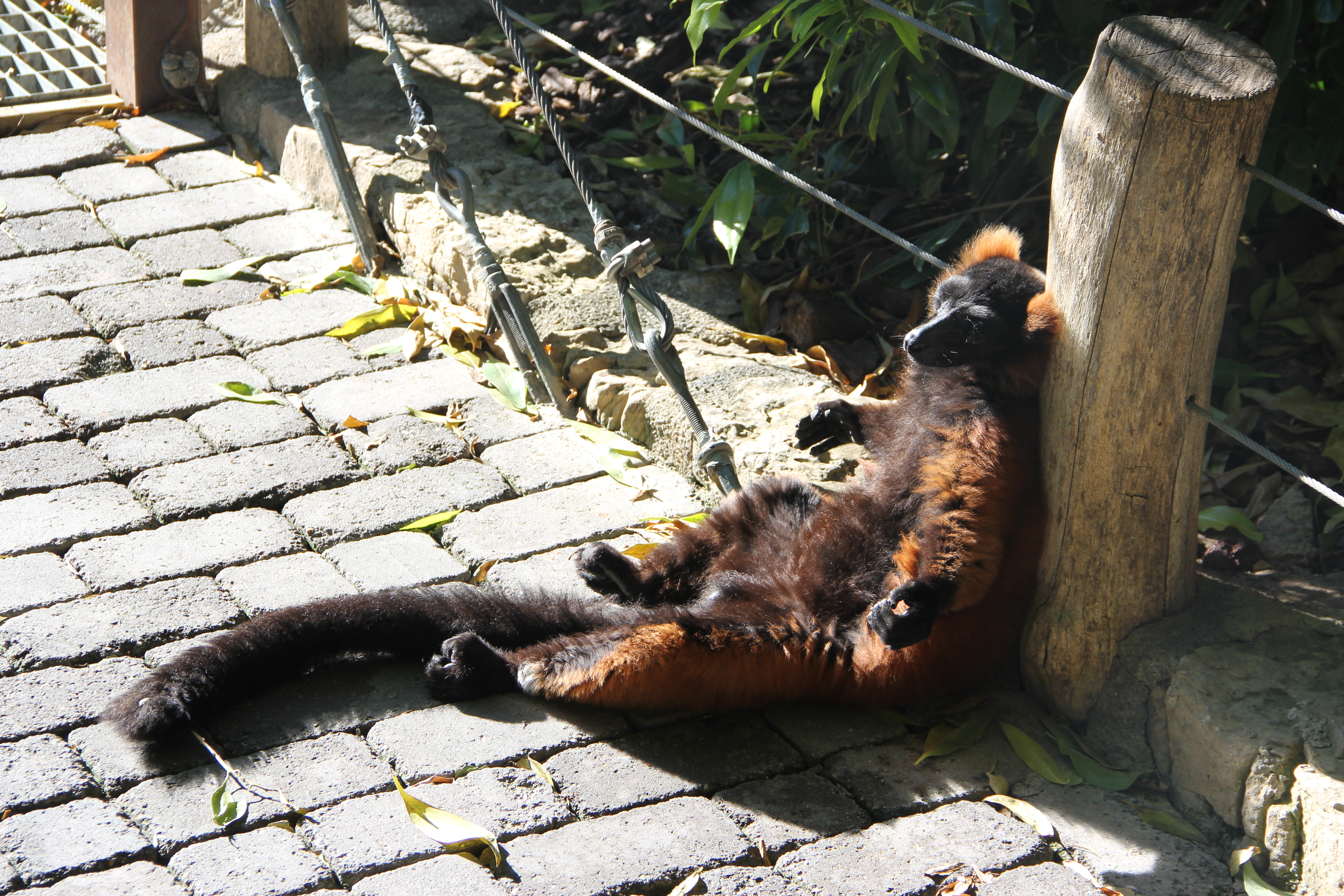 Varecia rubra se chauffant au soleil. Bioparc de Valence (Espagne) le 26 décembre 2013